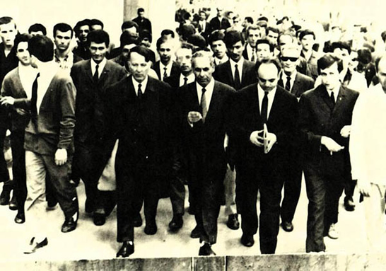 Atsız'ın Irkçılık-Turancılık davasına gidişi - 3 Mayıs 1944